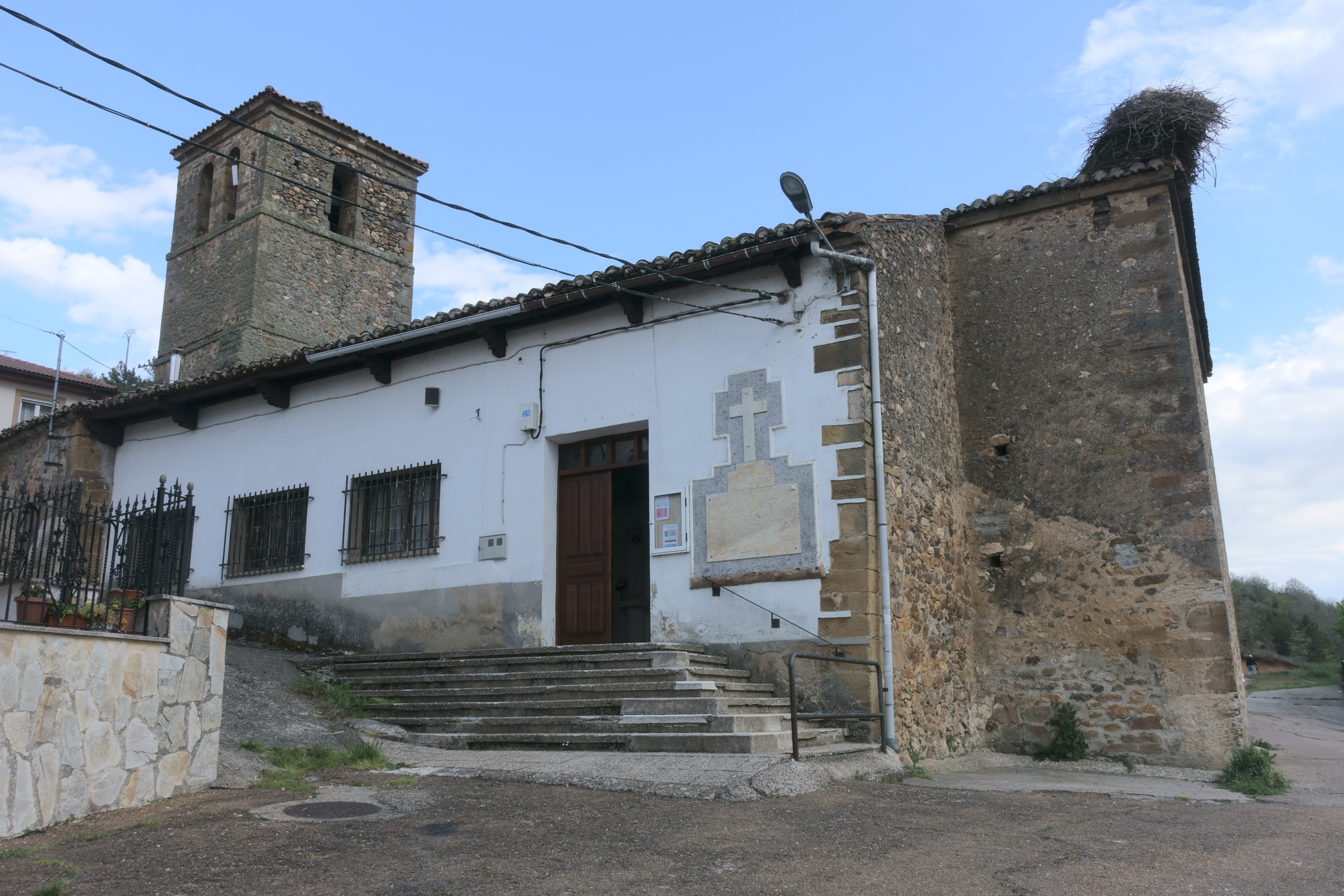 Iglesia de Nuestra Señora de la Asunción, Villalba de Guardo (Palencia, España).